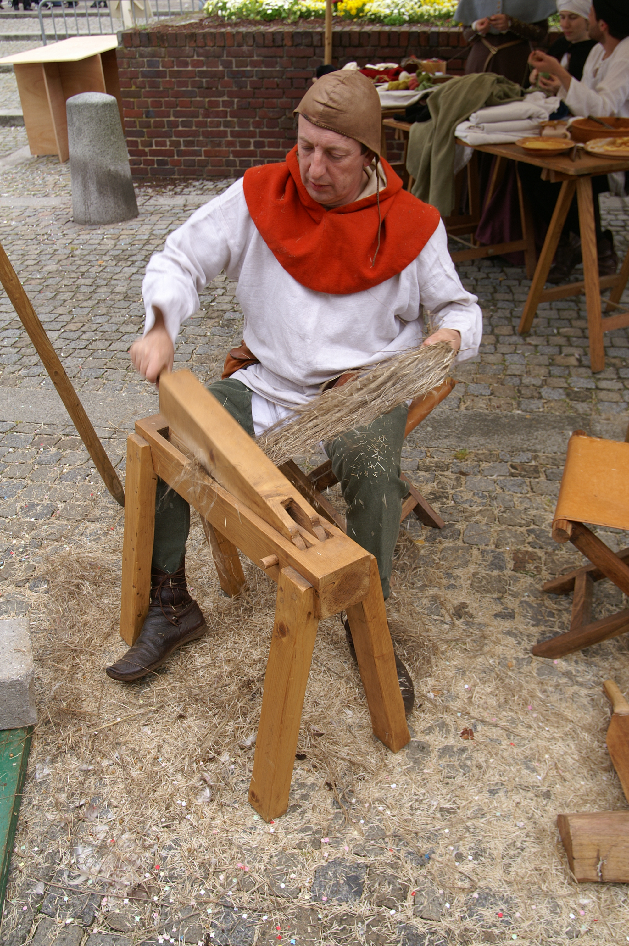 Teillage du lin par les Compagnons duellistes d’Harfleur.